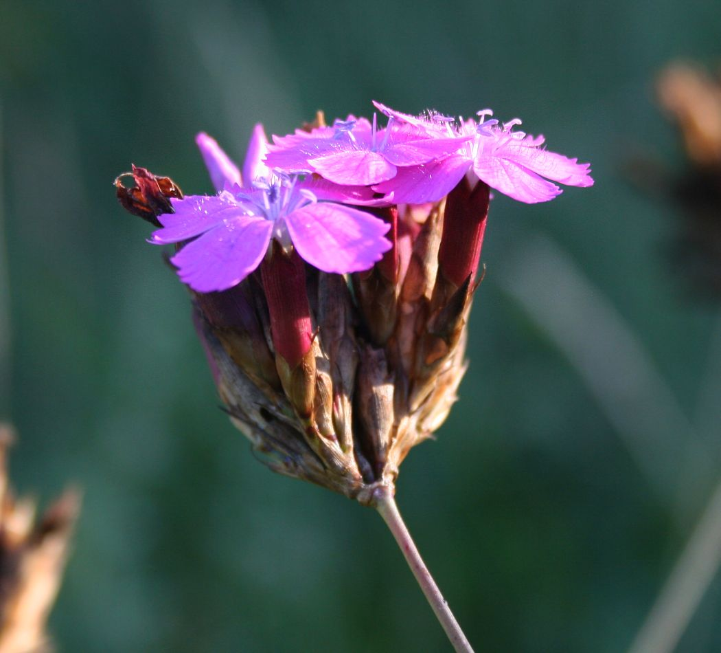 Pannonische Karthäuser-Nelke (Dianthus pontederae), Nelkengewächse (Caryophyllaceae) - Österreich/Austria/Autriche: Niederösterreich, Alpenostrand, Glaslauterriegel ca. 1.7 km SW Gumpoldskirchen